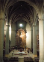 San Joan Bataiatzaileren eliza. Zintroniko.